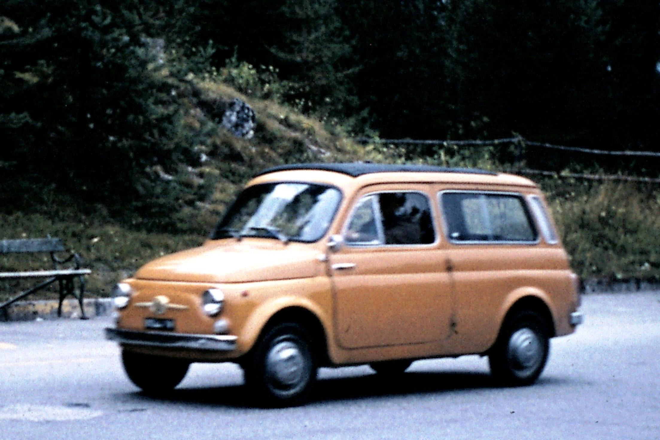 Fiat 500 Giardiniera (Dolimiti).